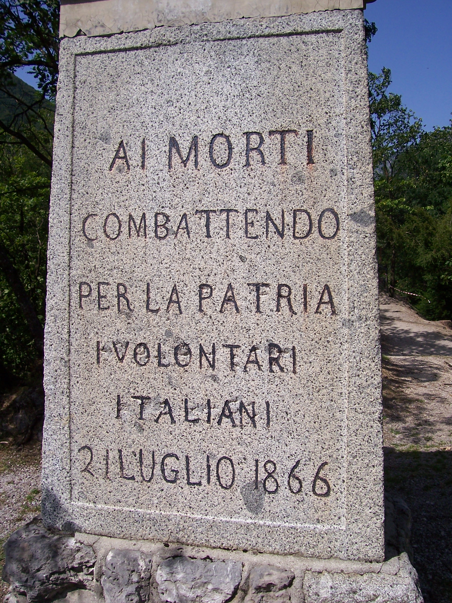 Lapide del 1866 a Bezzecca sita Colle di Santo Stefano